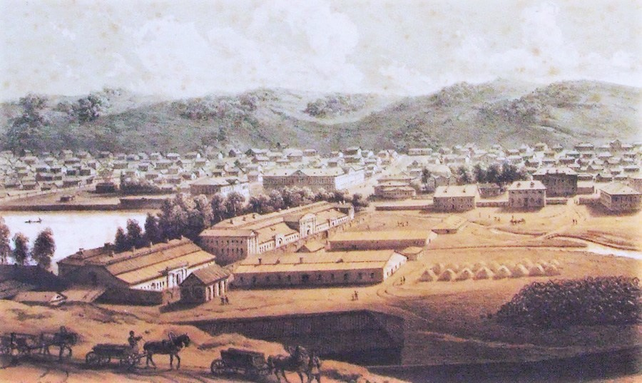 Вид города Барнаула с правого берега реки Барнаулки. Вторая половина 1850-х годов. Цветная гравюра по рисунку томского художника П. М. Кошарова.